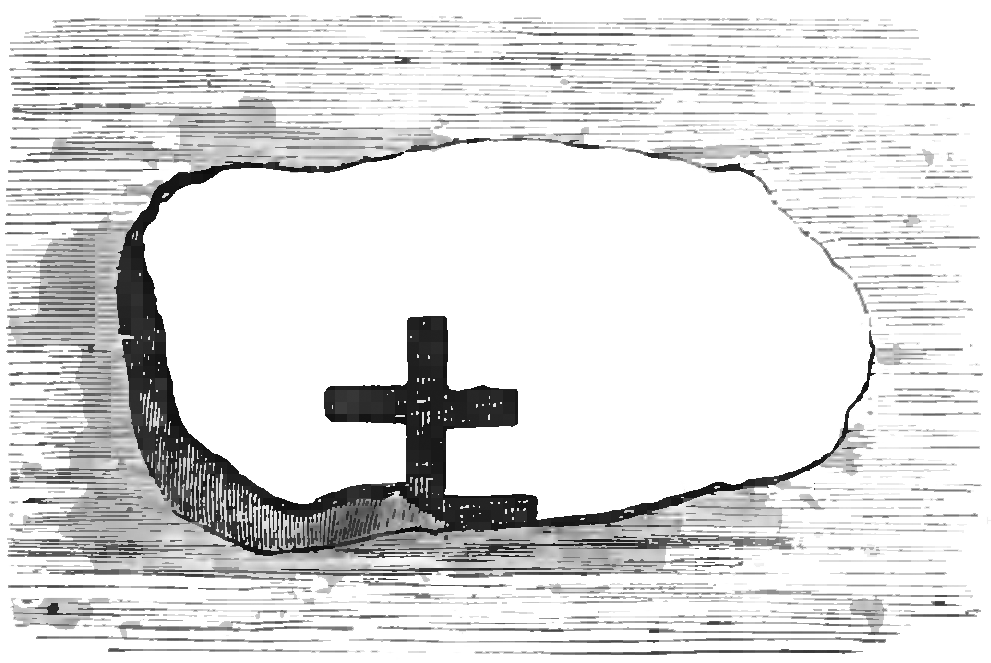 Иллюстрация книги «Белорусские древности» стр.99 илл.64